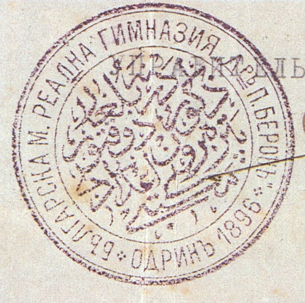 Печат на Одринската българска гимназия.